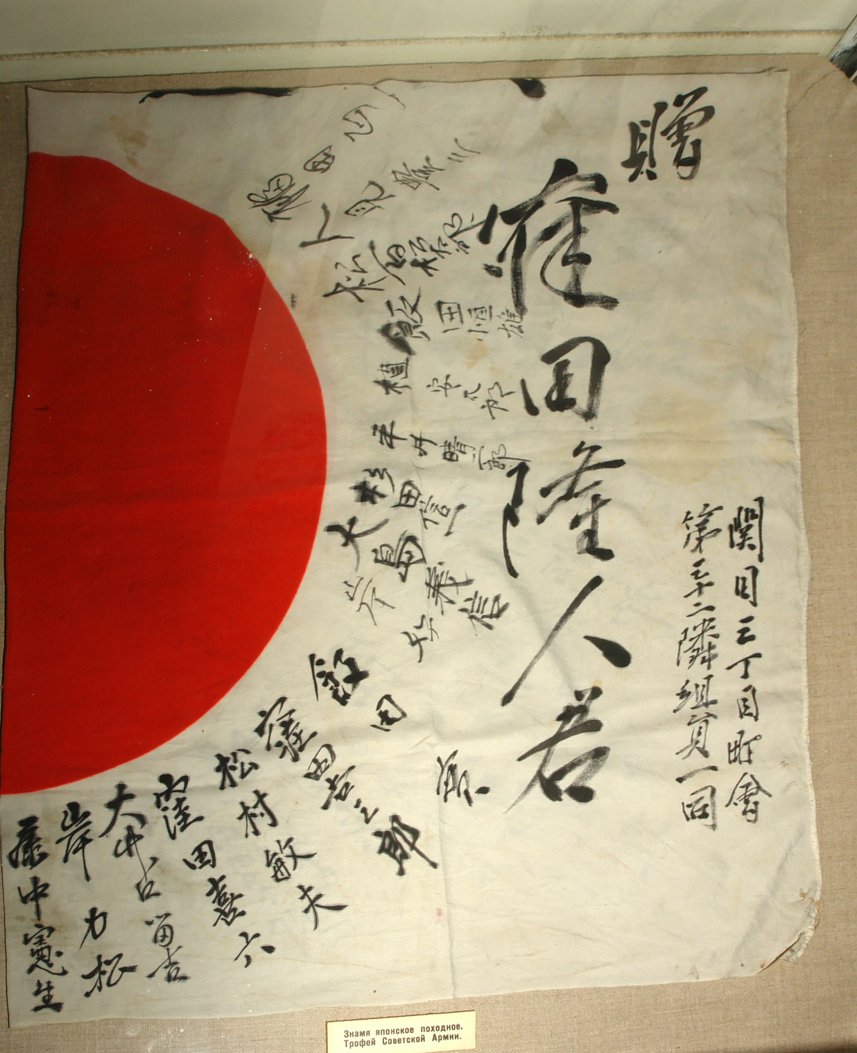 Знамя японское походное. Трофей Советской Армии. Военно-исторический музей артиллерии, инженерных войск и войск связи, Санкт-Петербруг.